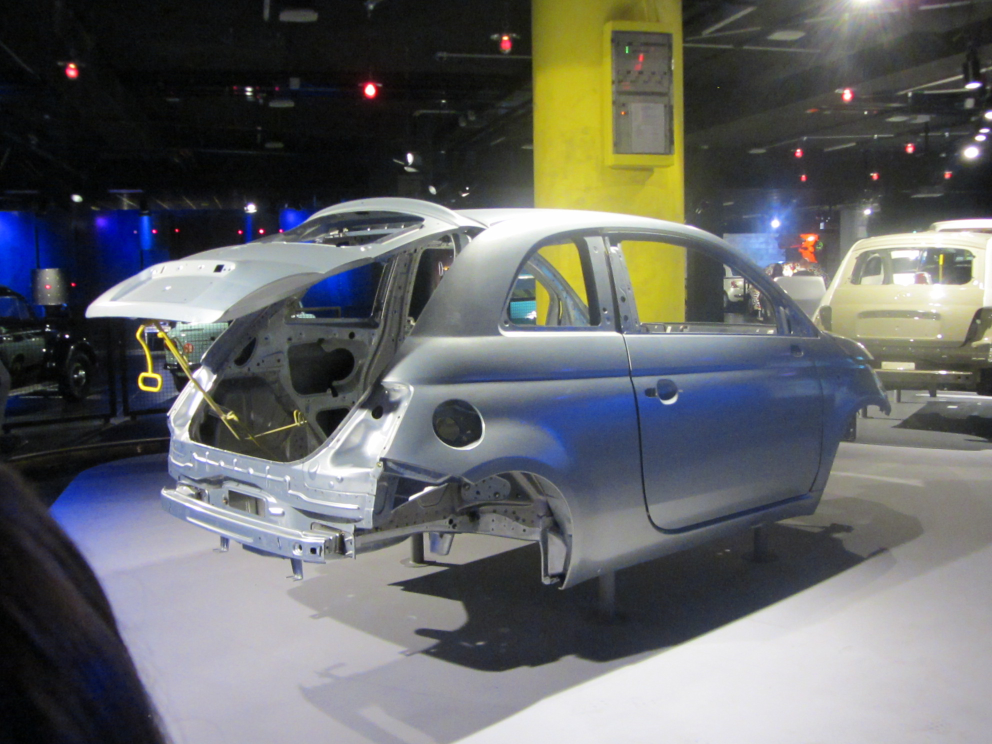 Tour su rotaia a bordo di un vagoncino a 4 posti per vedere a 360 gradi la linea di assemblaggio di una Fiat 500 (2007) dallo stampaggio alla verniciatura all'assemblaggio e alla finitura. in questa foto: Stampaggio e saldatura delle lamiere